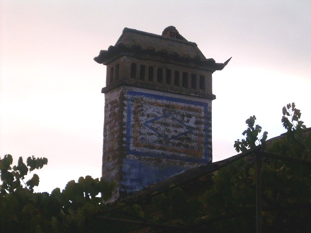 Chaminé em Carvalhal, Abrantes Photo by Usuário:Manuel Anastácio